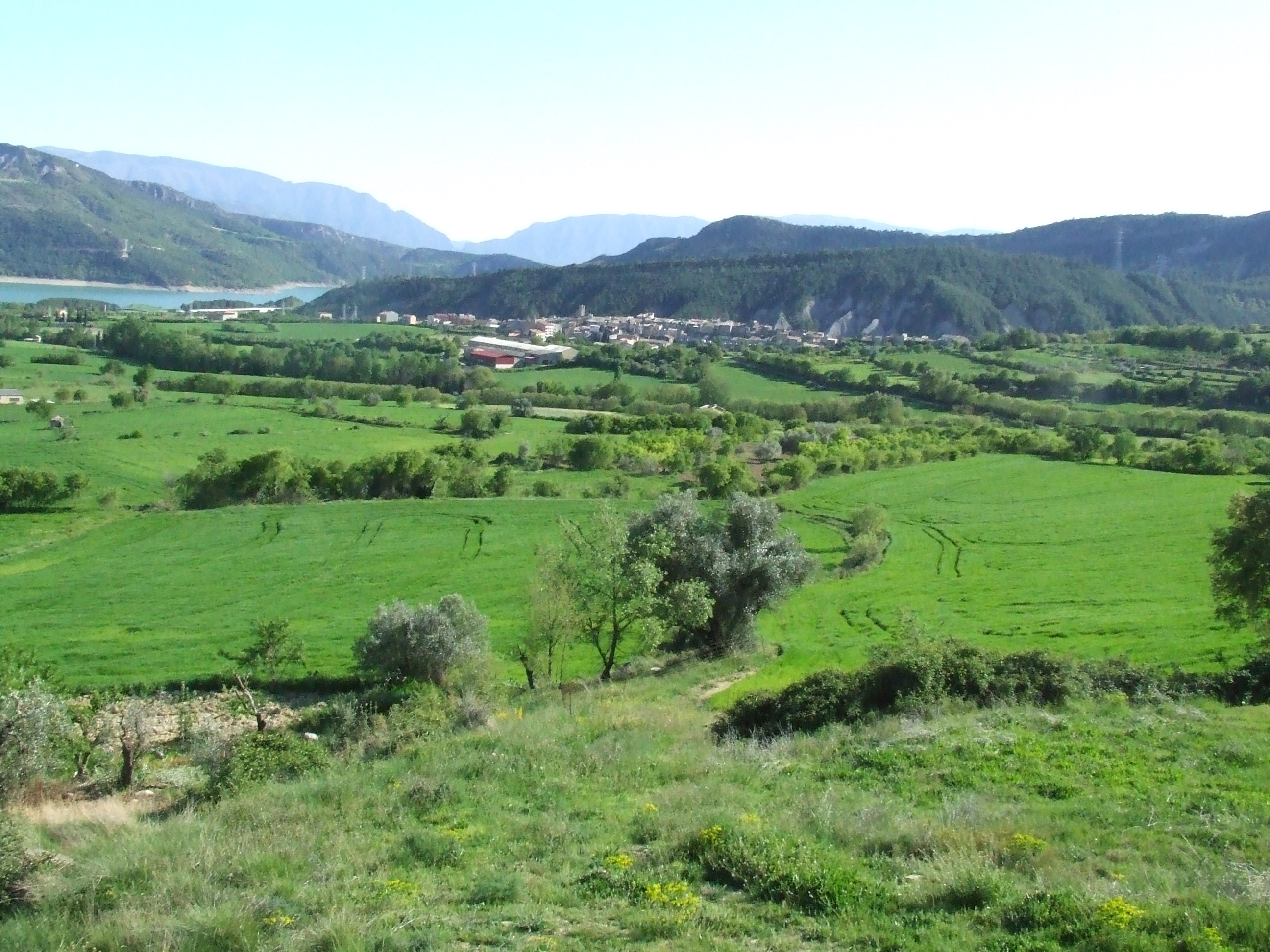 Vista general de Salàs de Pallars (Pallars Jussà)